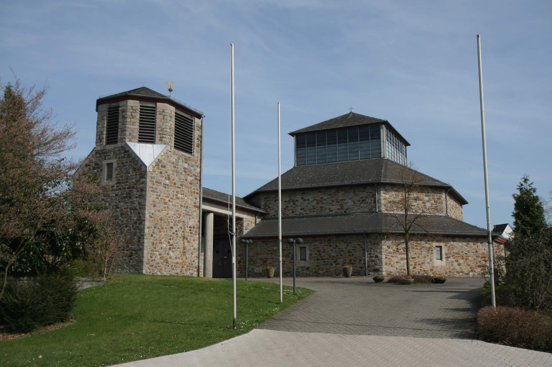 Katholische Kirche Sankt Stephanus Niedereimer in Arnsberg-Niedereimer. Nach Plänen der Architekten Giesbert Hülsmann erbaut. Am 2. Oktober 1983 von Erzbischof Johannes Joachim Degenhardt eingeweiht.